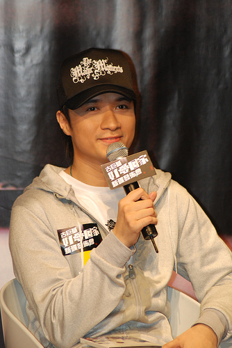 Leo Ku